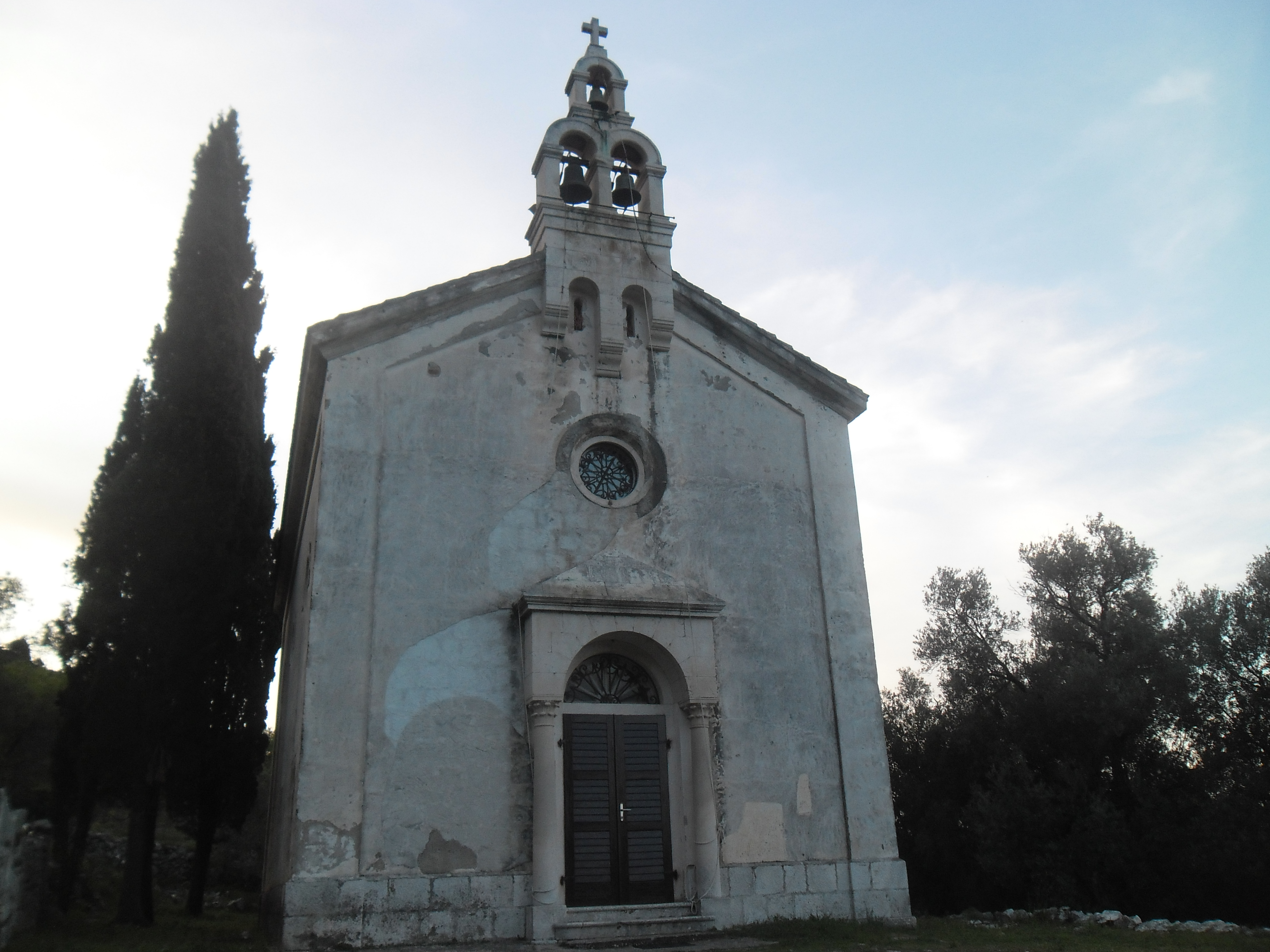 Maranovići na otoku Mljetu